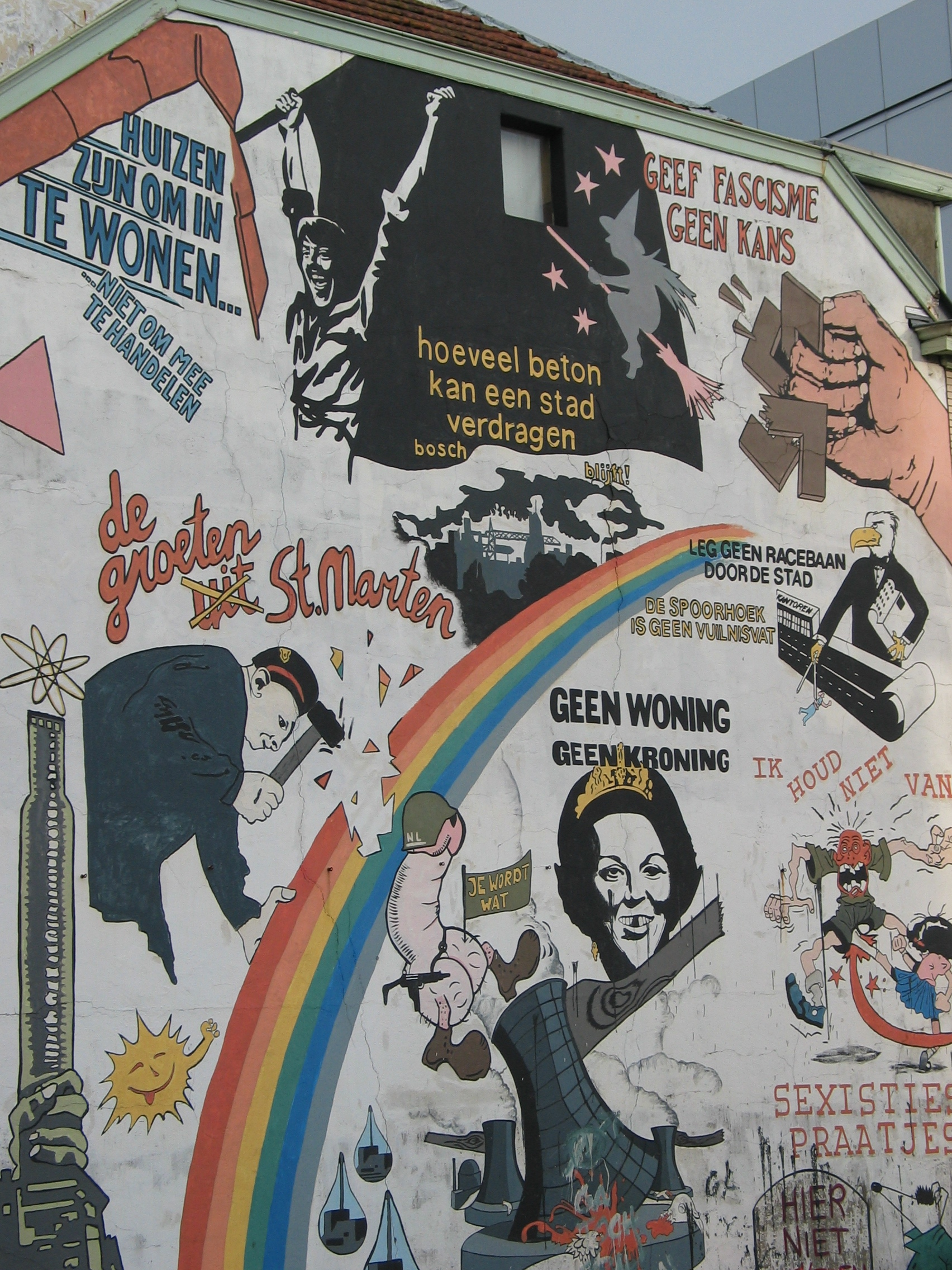 Wall at Hotel Bosch in Arnhem, NLD